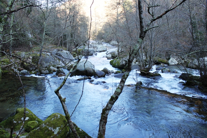 Rio Bestança em Vila Muros